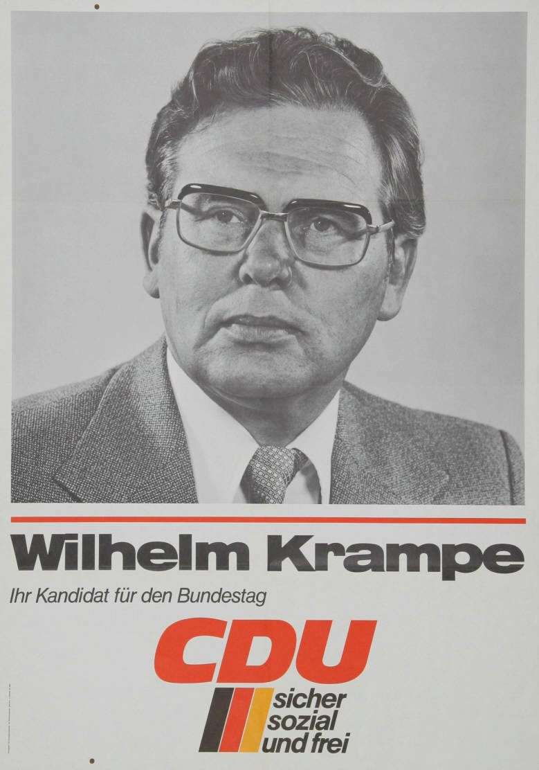 Wilhelm Krampe Ihr Kandidat für den Bundestag CDU sicher sozial und freiAbbildung:PorträtfotoPlakatart:Kandidaten-/Personenplakat mit PorträtAuftraggeber:CDU-Bundesgeschäftsstelle, Abt. Öffentlichkeitsarbeit, BonnObjekt-Signatur:10-001: 2064Bestand:Plakate zu Bundestagswahlen (10-001)GliederungBestand10-18:Plakate zu Bundestagswahlen (10-001) » Die 8. Bundestagswahl am 3. Oktober 1976 » CDU » Mit PorträtfotoLizenz:KAS/ACDP 10-001: 2064 CC-BY-SA 3.0 DE